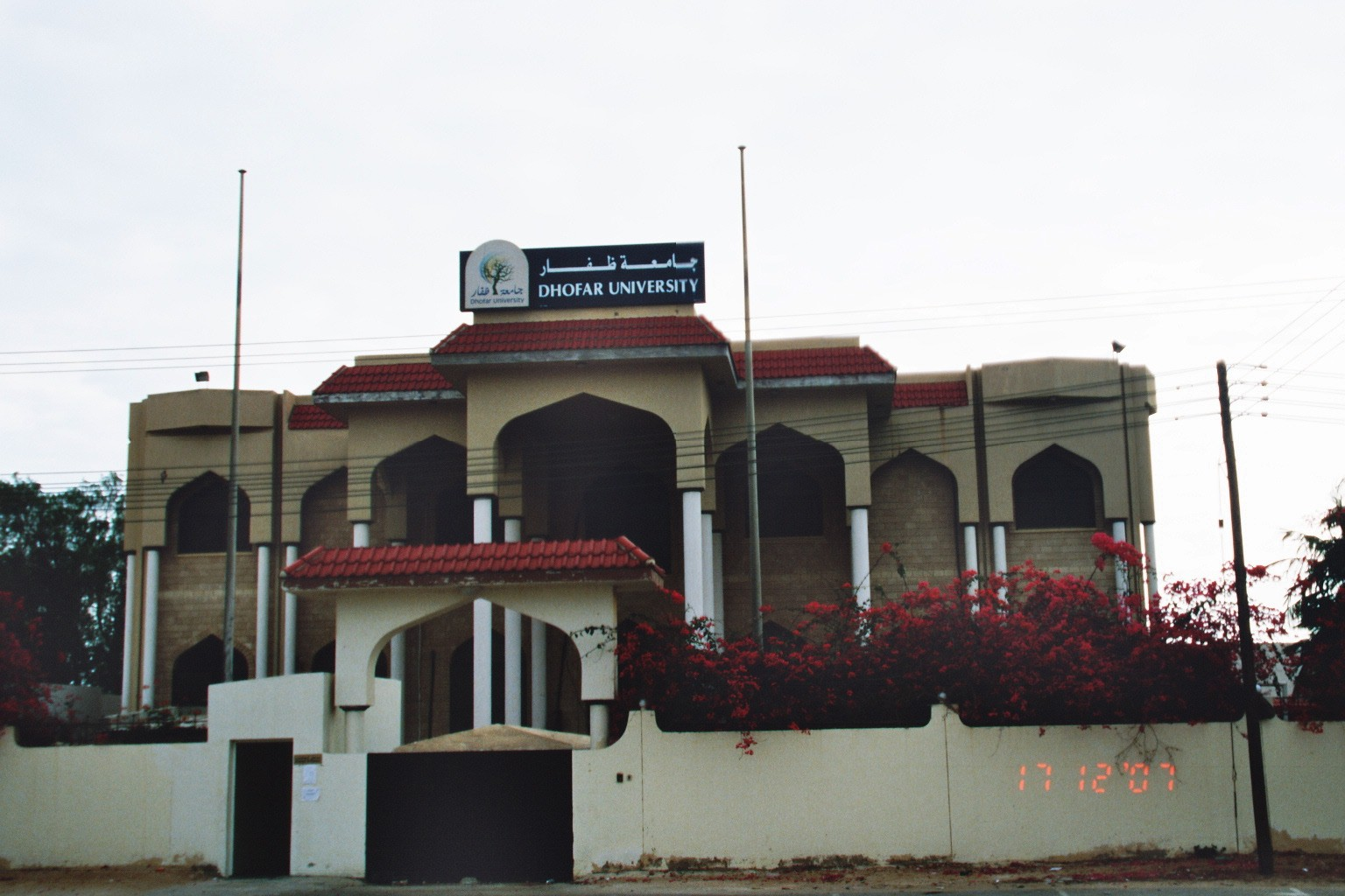 Dhofar Universität - Haupteingang